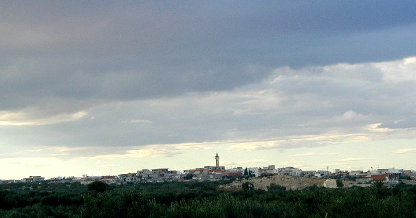 Ksibet El Medouini vu de Lamta